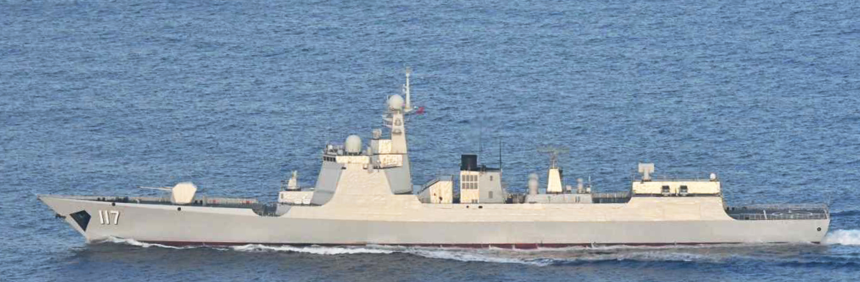 ７月２５日（木）午前５時頃、海上自衛隊第５航空群所属「Ｐ－３Ｃ」（那覇） 及び佐世保地方隊所属「あまくさ」（佐世保）が、宮古島の北約２４０ｋｍの海 域を南下する中国海軍ルーヤンⅢ級ミサイル駆逐艦１隻、ジャンカイⅡ級フリ ゲート２隻及びフユ級高速戦闘支援艦１隻の計４隻を確認した。 その後、これらの艦艇が沖縄本島と宮古島の間の海域を南下し、太平洋へ向け て航行したことを確認した。